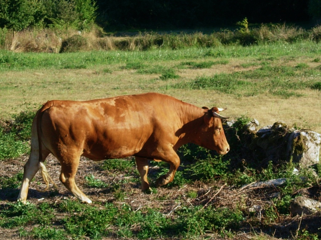 Vaca gallega.